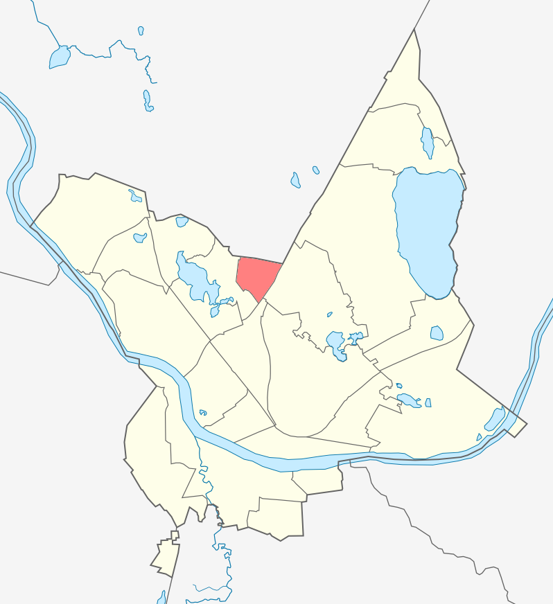 Микрорайон Новый Форштадт карте Даугавпилса.